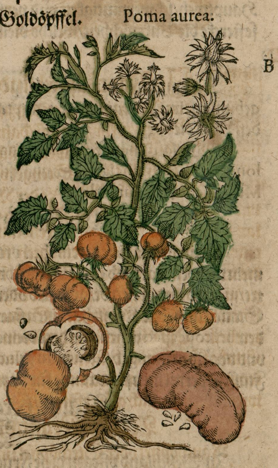 Première représentation de la tomate (Solanum lycopersicum) en Europe. Image extraite du Kreutterbuch. bey Johan Feyerabendt (1590).